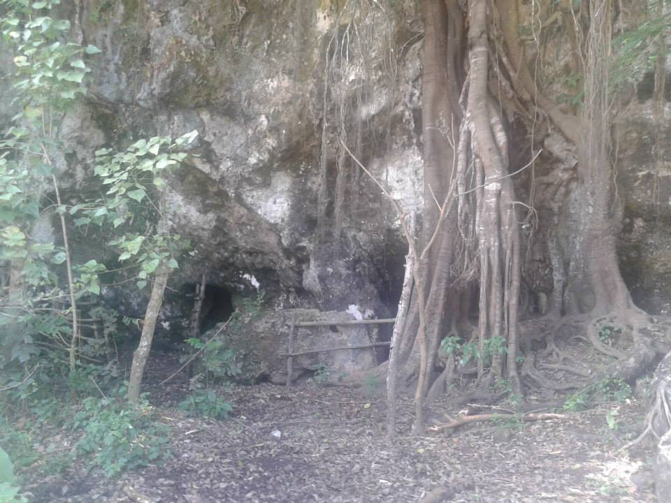 Leohito